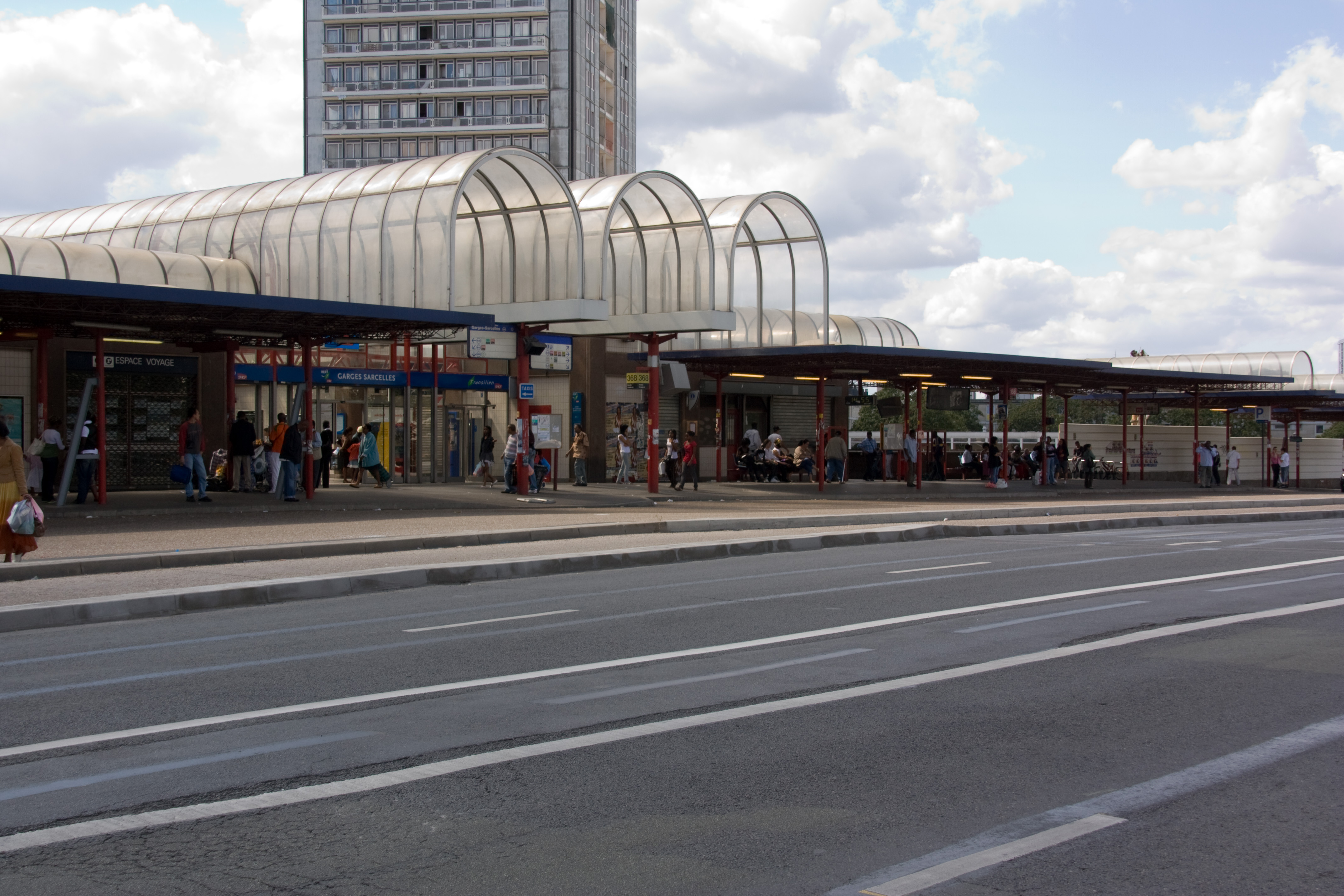 La Gare de Garges - Sarcelles, département du Val-d'Oise, France